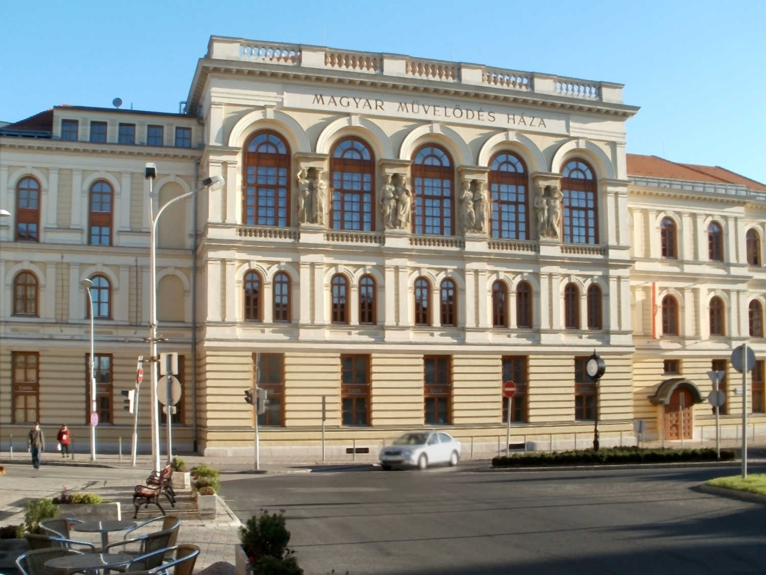 Liszt Ferenc kultúrház, Kaszinó (Sopron, Liszt Ferenc utca 1., Széchenyi István tér) This is a photo of a monument in Hungary, Identifier: 4828